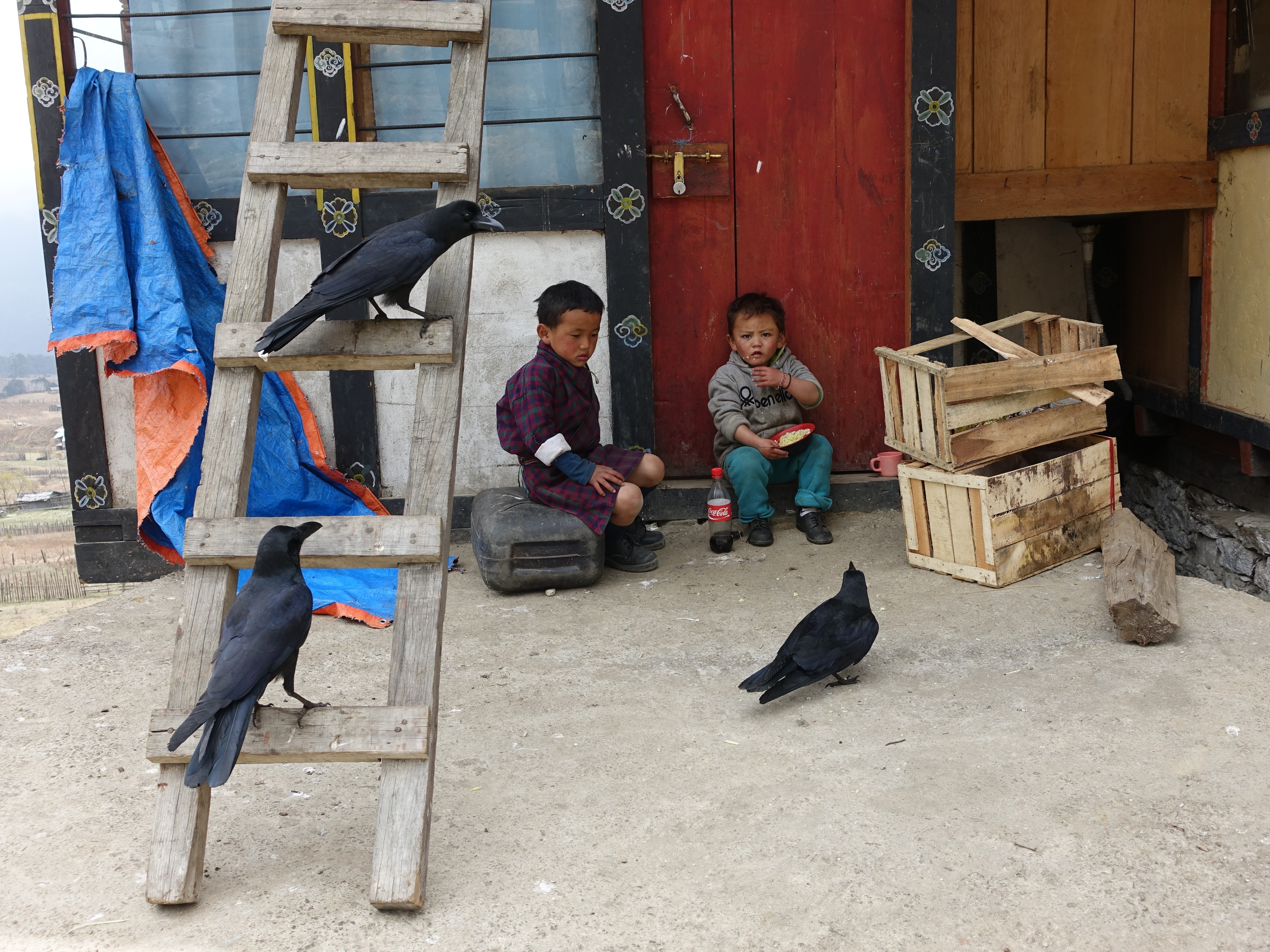 Kinder mit Rabenvögel